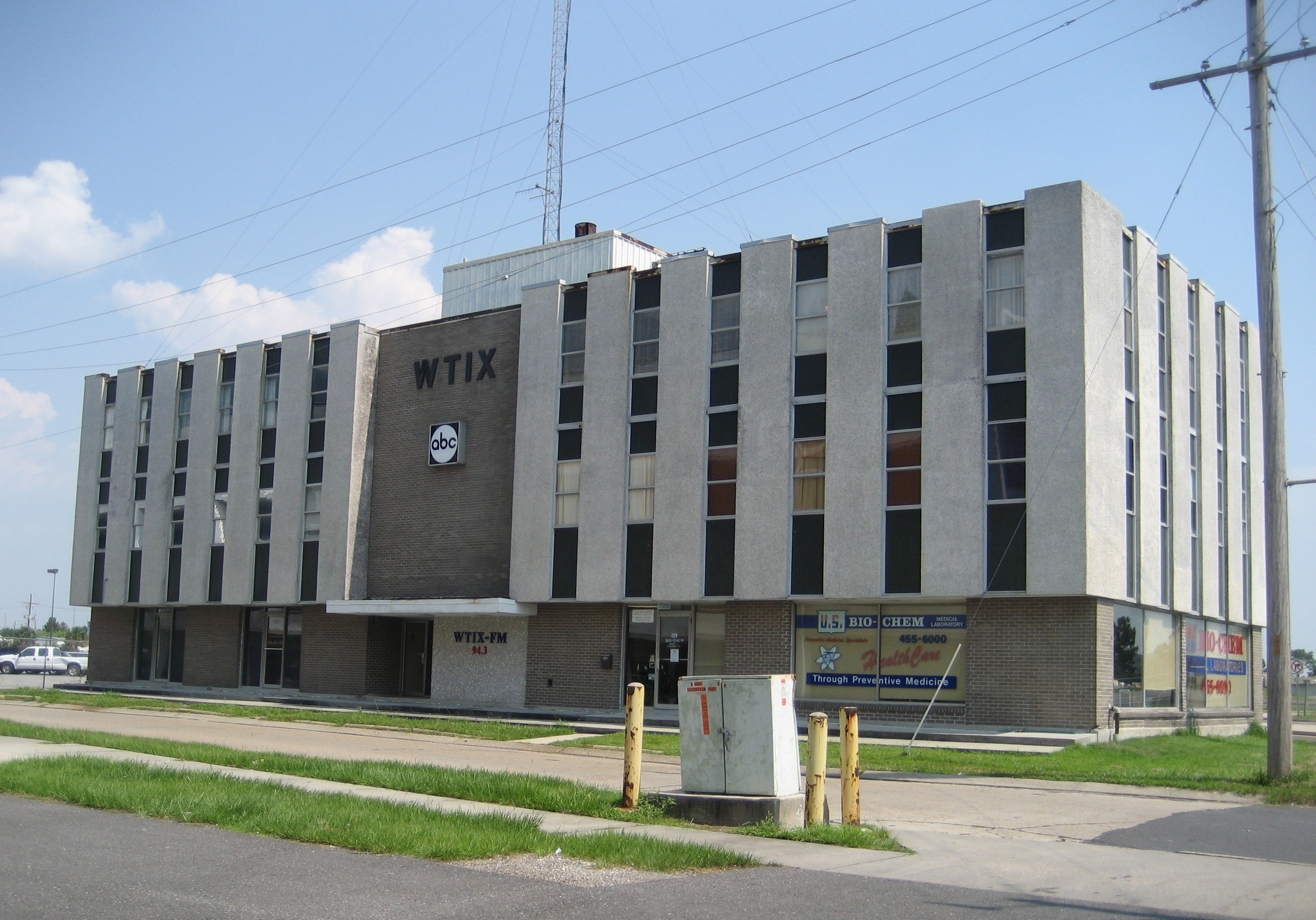 Radio WTIX building, Metairie, Louisiana